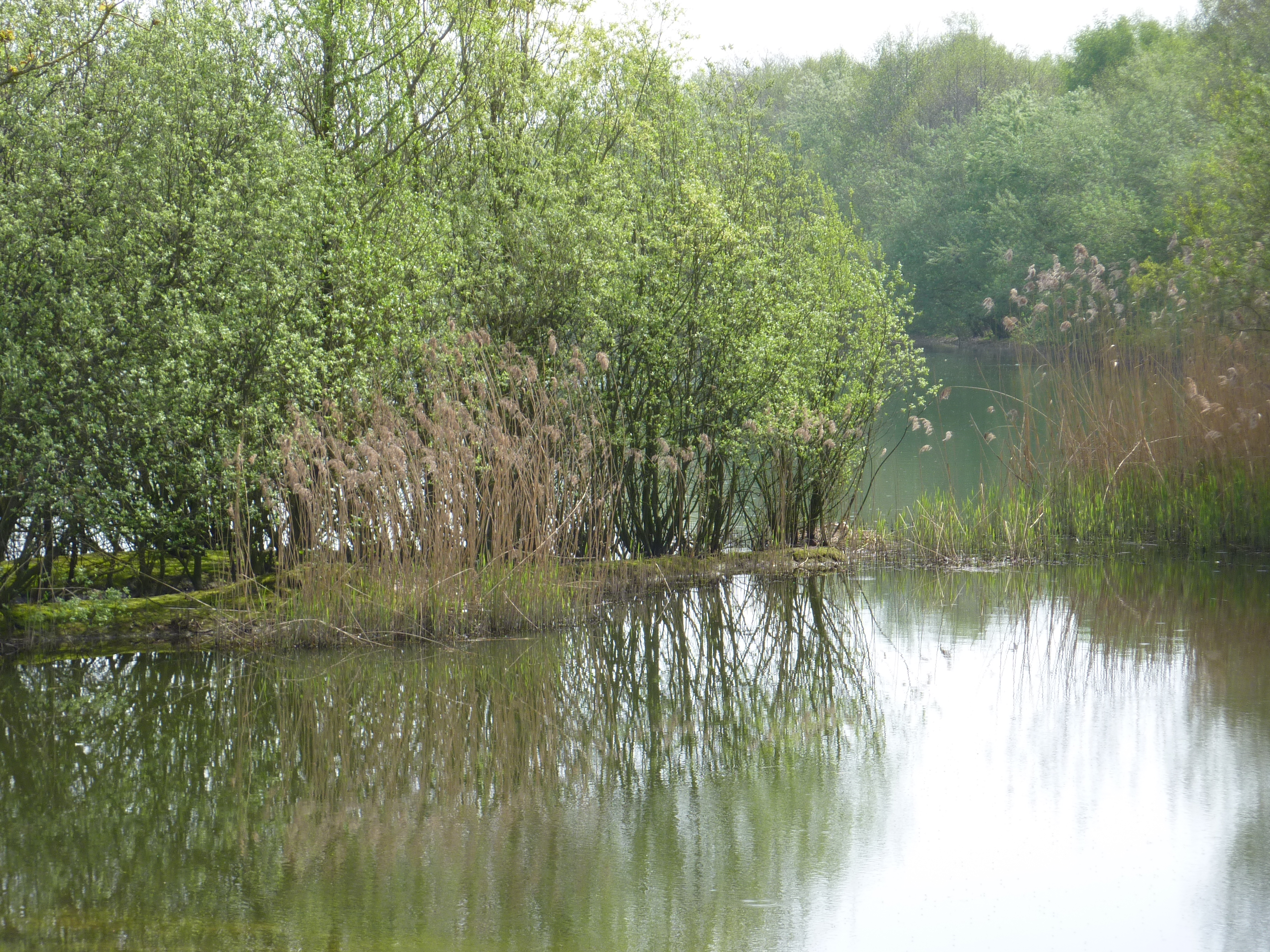 Linderveldplas van westzijde